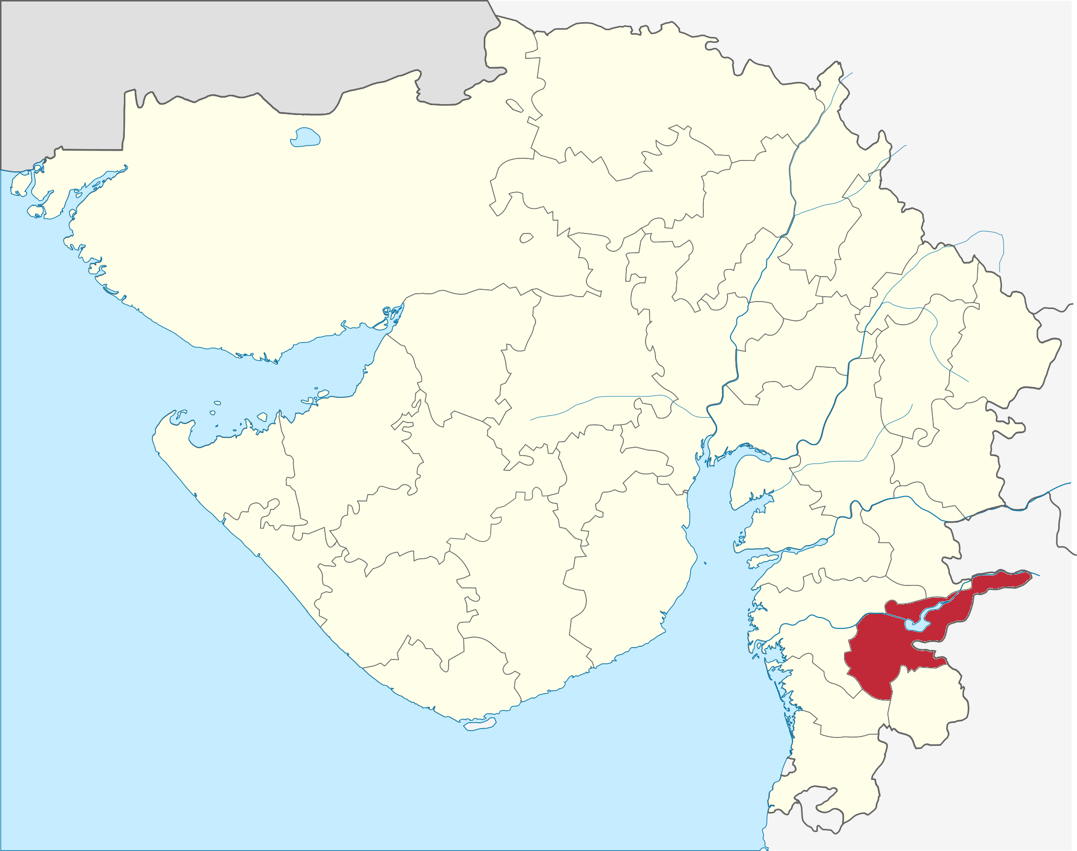 Distrito de Tapi en Gujarat